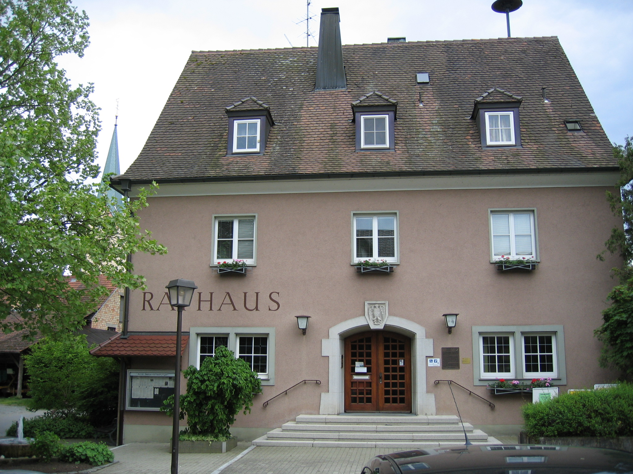 Rathaus in Eriskirch.